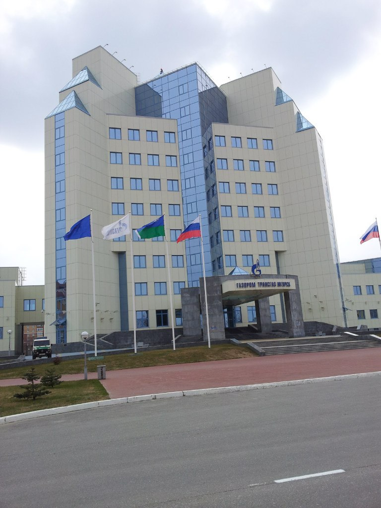 Офис ООО "Газпром трансгаз Югорск"